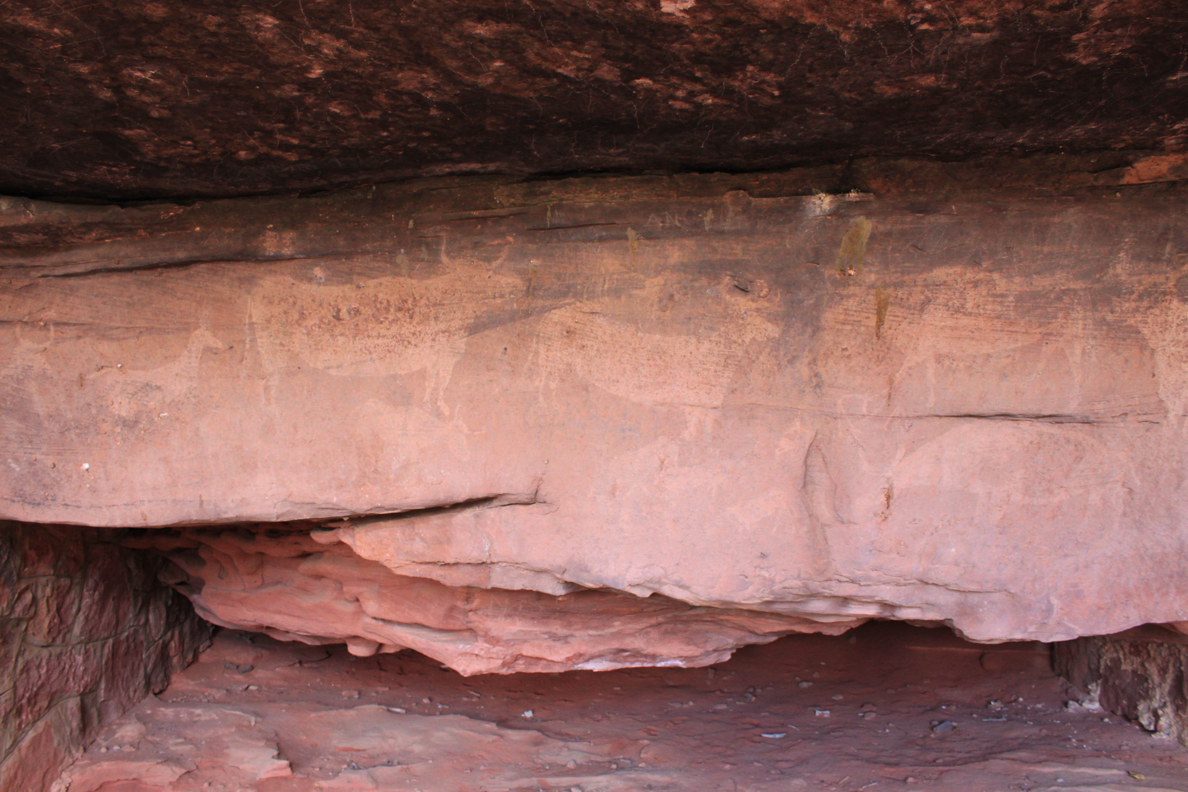 Abrigo de Toros del prado del Navazo situado en la Sierra del Rodeno en el término municipal de Albarracín, Teruel, España.